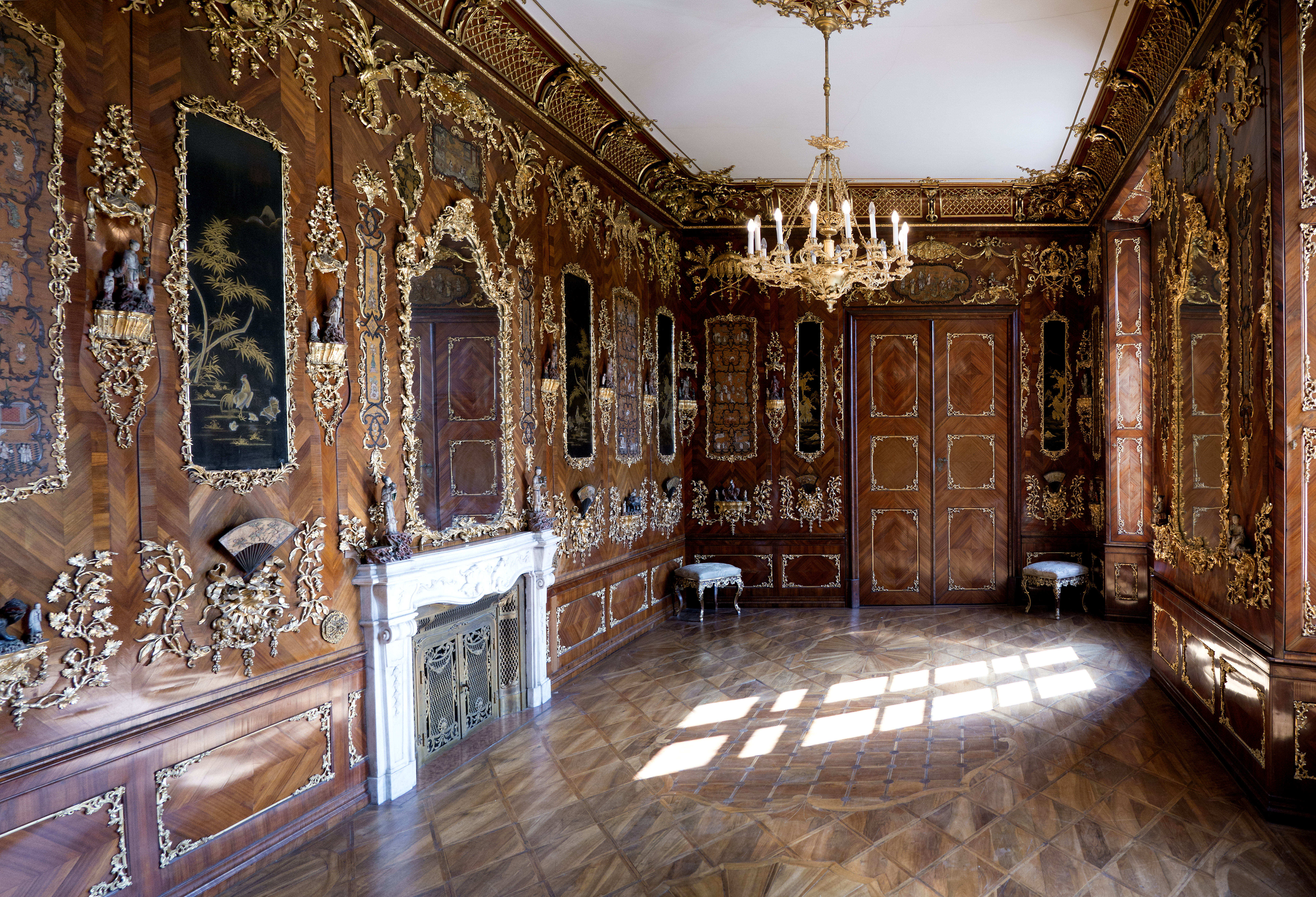 Schloss Hetzendorf – Festsaal und Chinesisches Zimmer Dieses Bild wurde anlässlich des österreichischen Tags des Denkmals 2014 in Wien eingereicht.